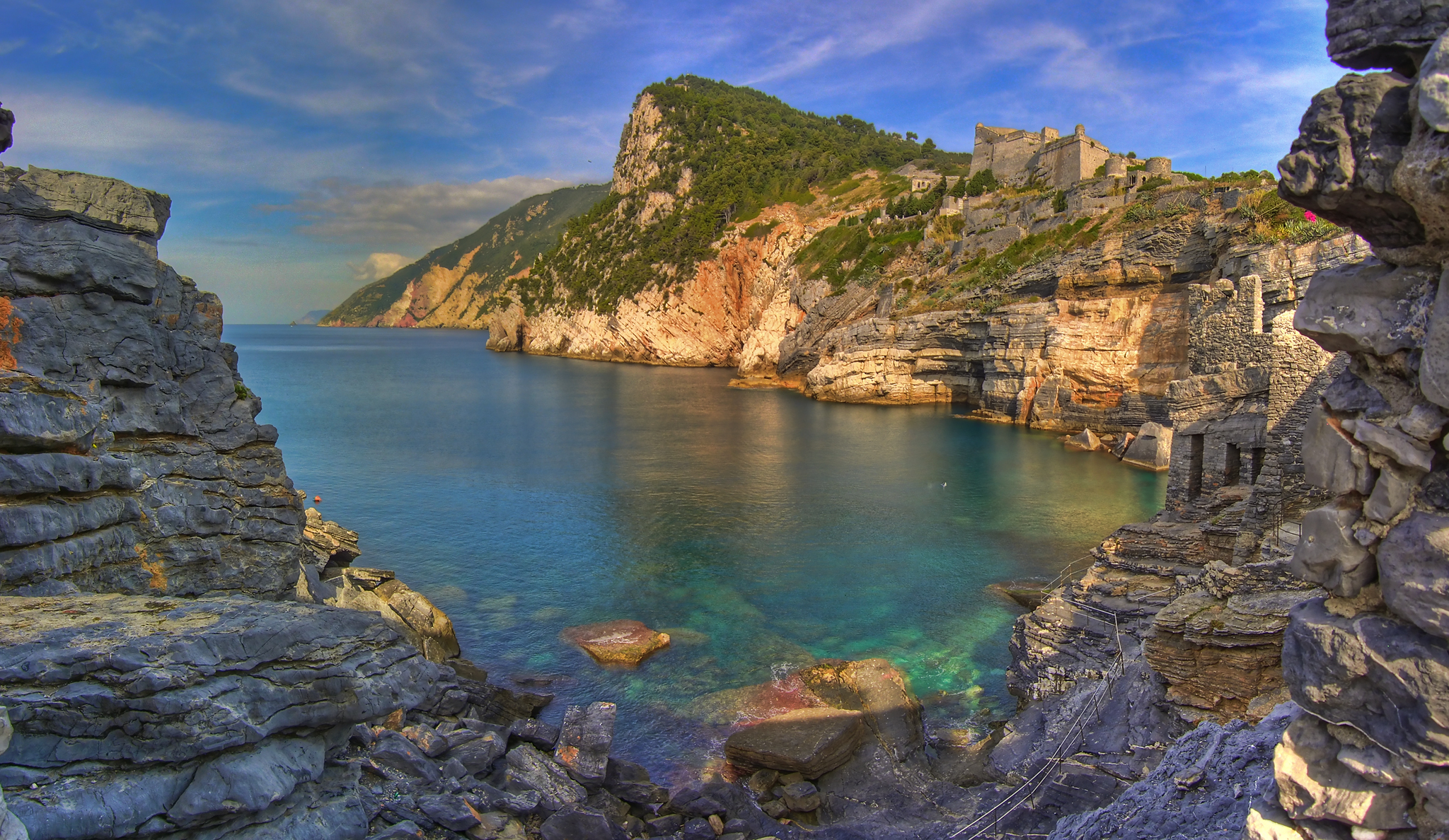 Grotta di Byron, Portovenere, Liguria, Italy Pano, HDR